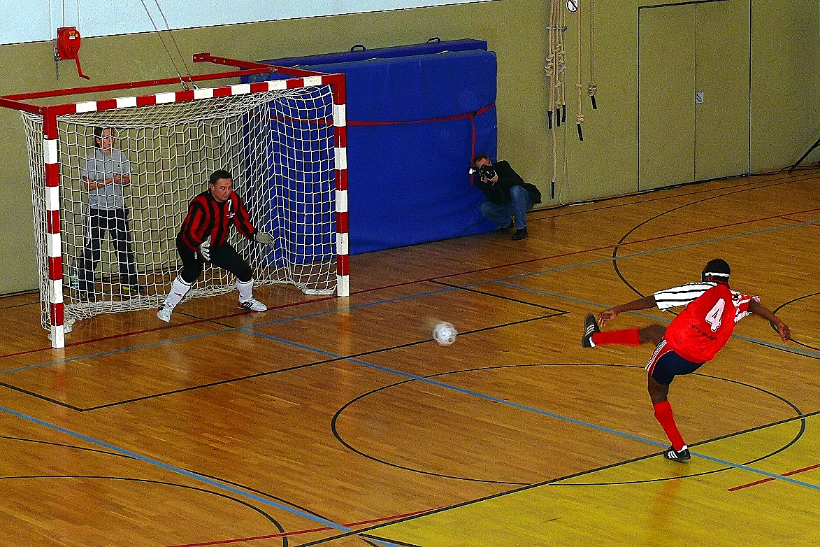 Blindenfußball. Elfmeter zum 1:0 für Stuttgart gegen Berlin